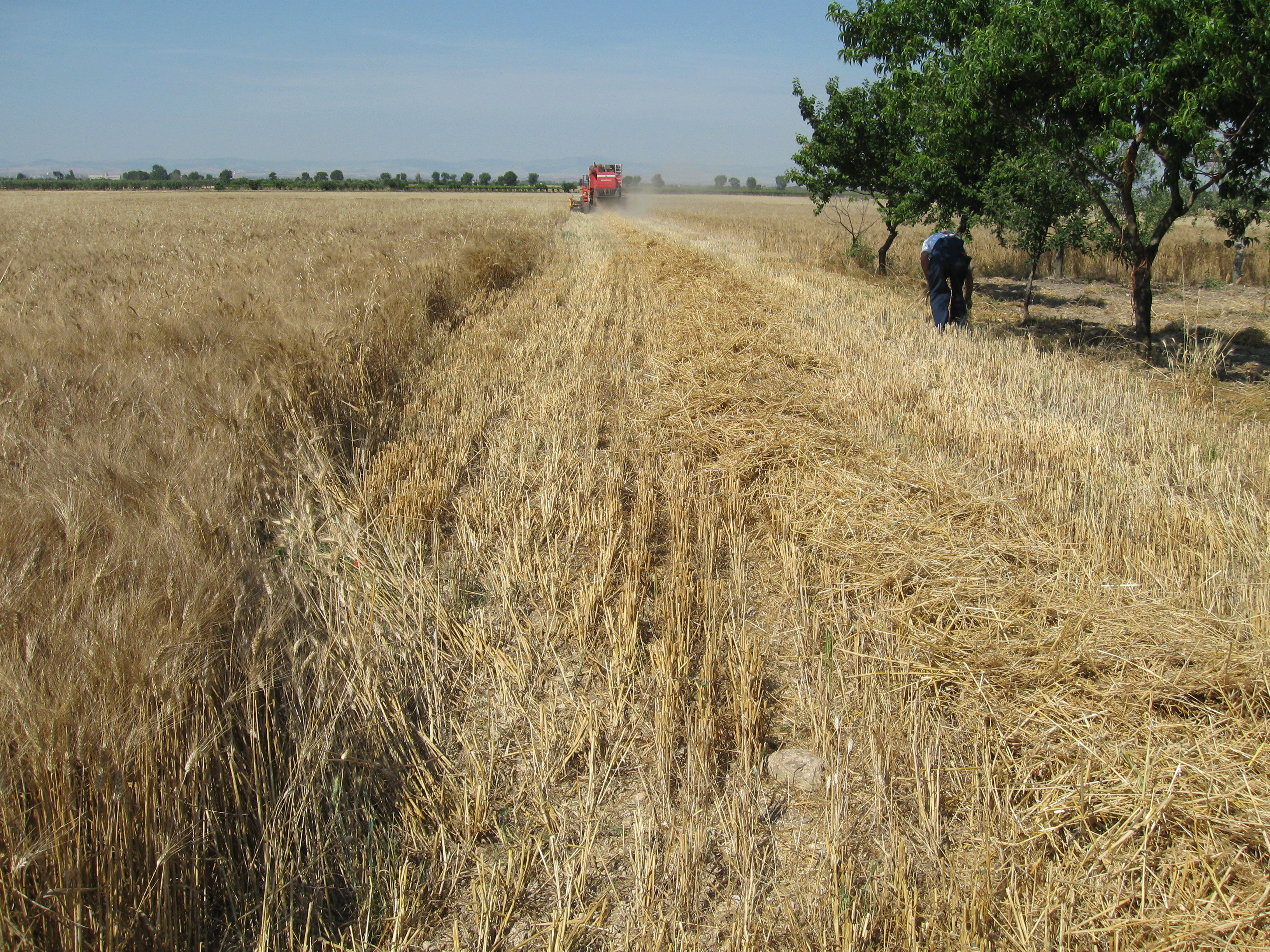 Raccolta del Grano con mietitrebbia nella Provincia di Foggia